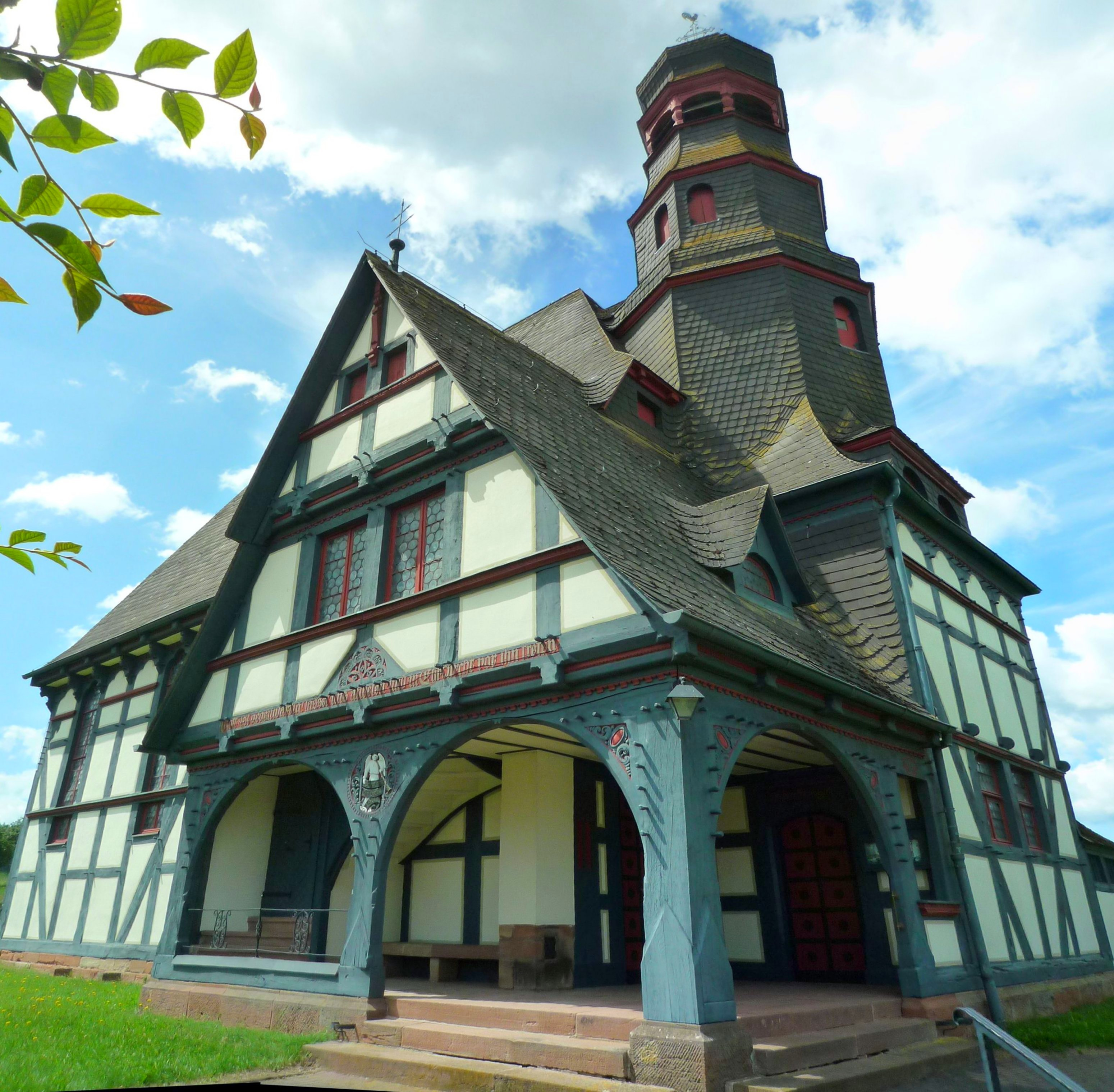 Fachwerkkirche in Mohnhausen